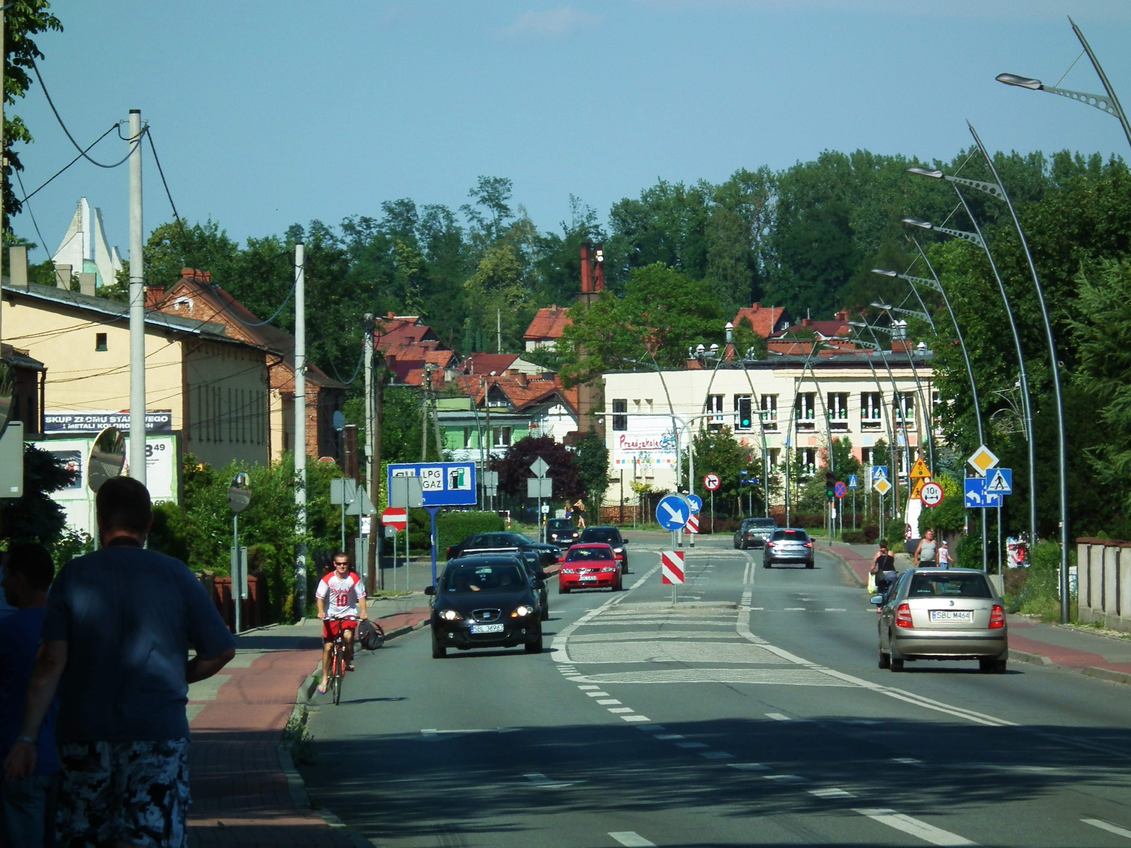 Lędziny. Hołdunów, ul. Hołdunowska.